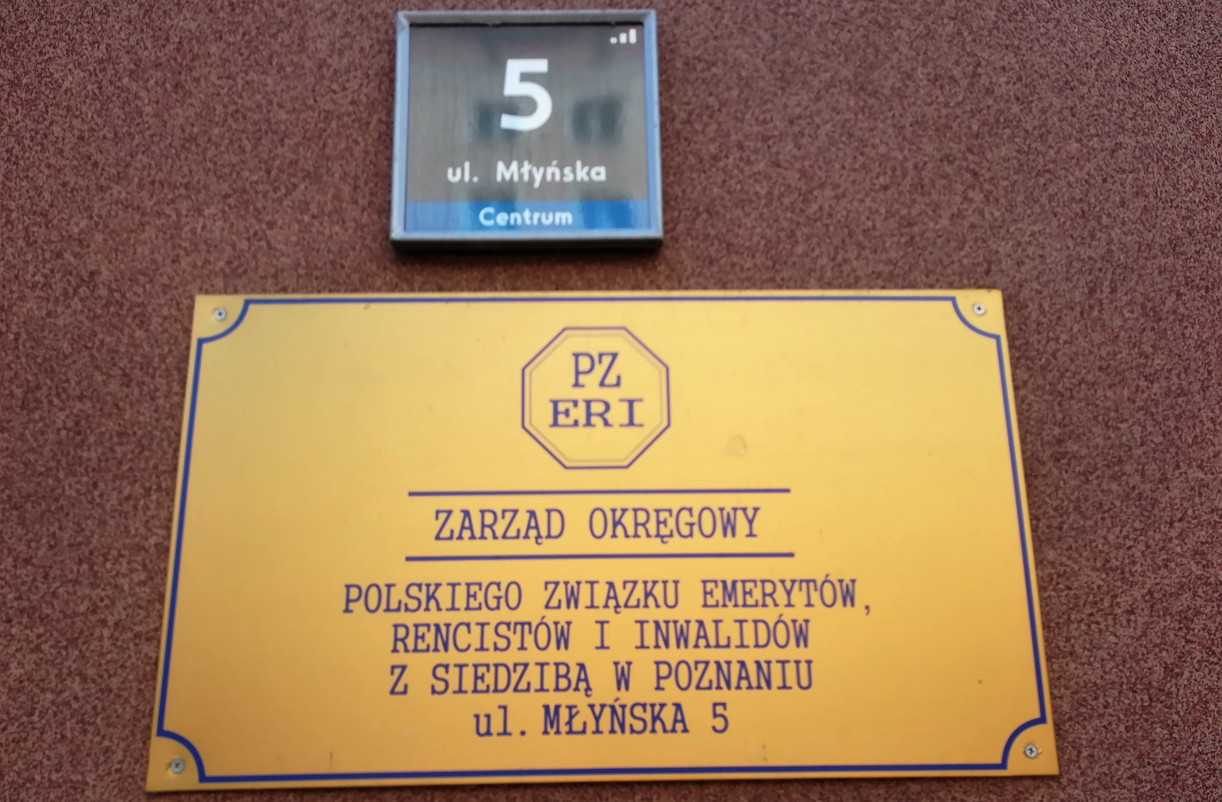 Siedziba ZO PZERI w Poznaniu - ul. Młyńska.